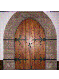 Porta de arco quebrado (sec. XV)